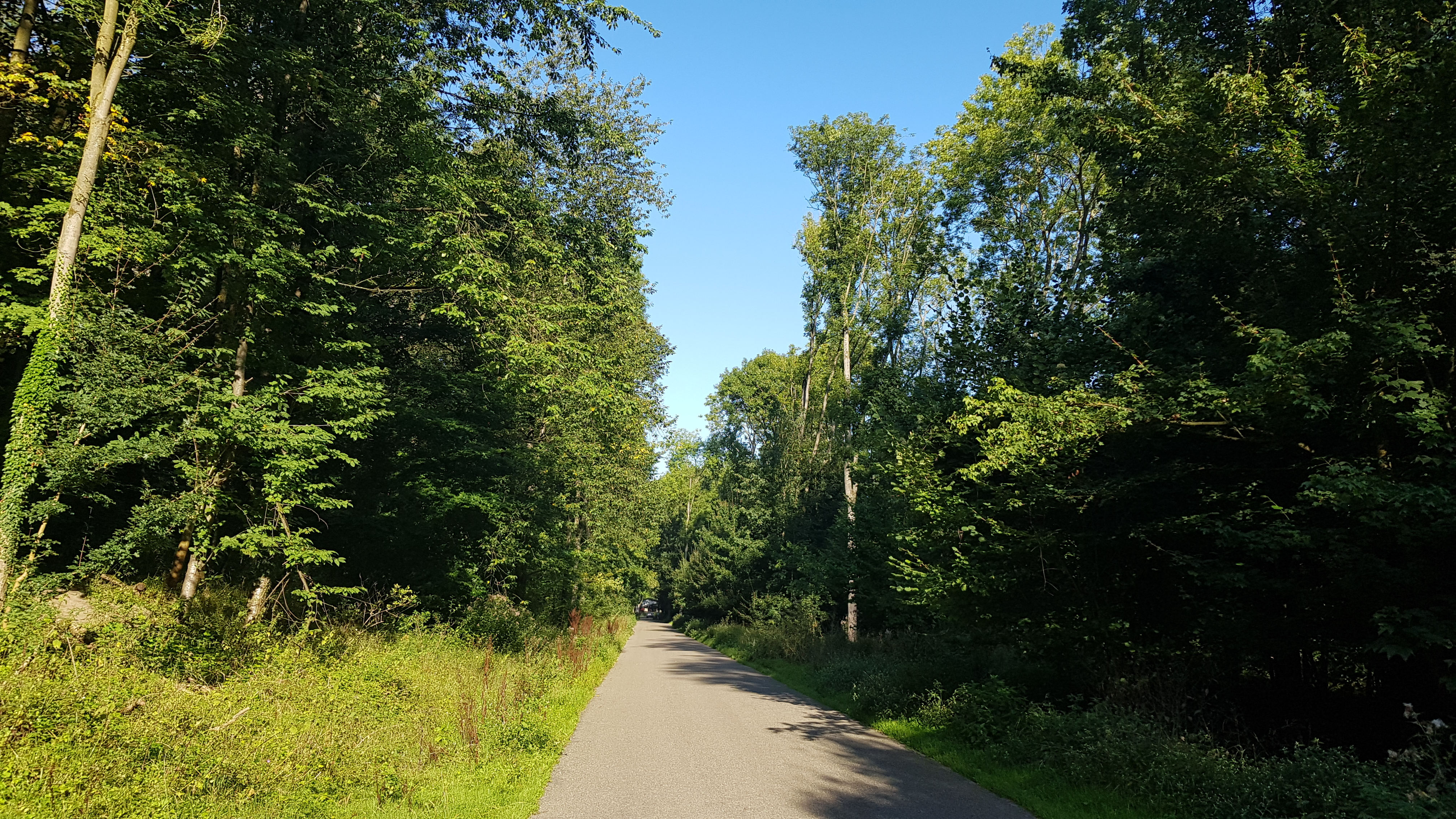 Meerssenderbroek, Meerssen, Nederland